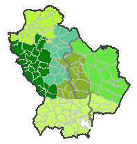 Diocesi della regione ecclesiastica Basilicata.